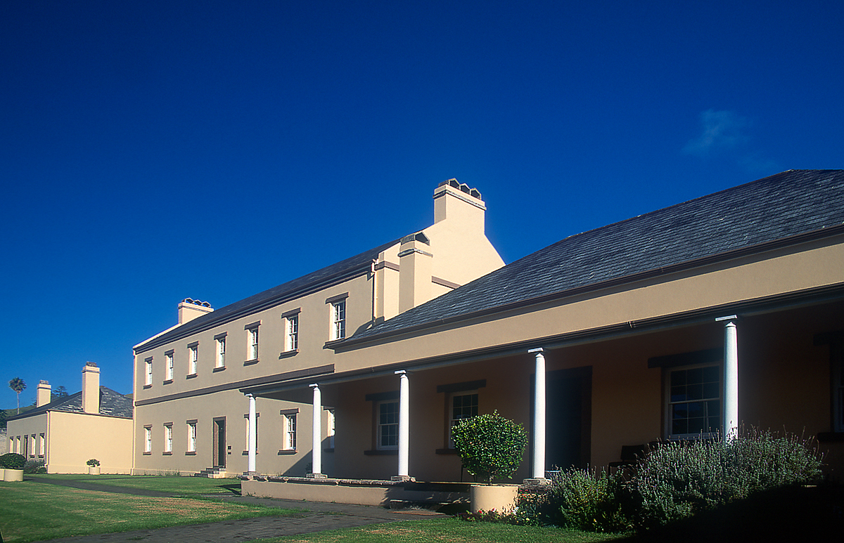 Norfolk Island jail.